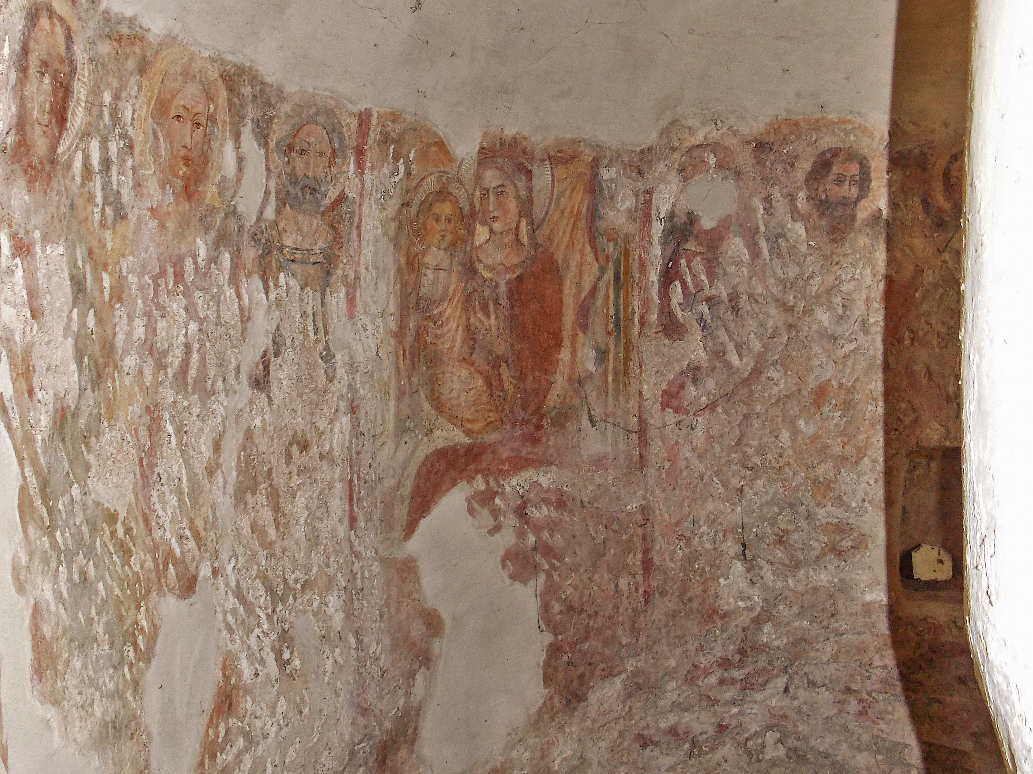 La chiesa dell'Annunziatella ad Arpaia